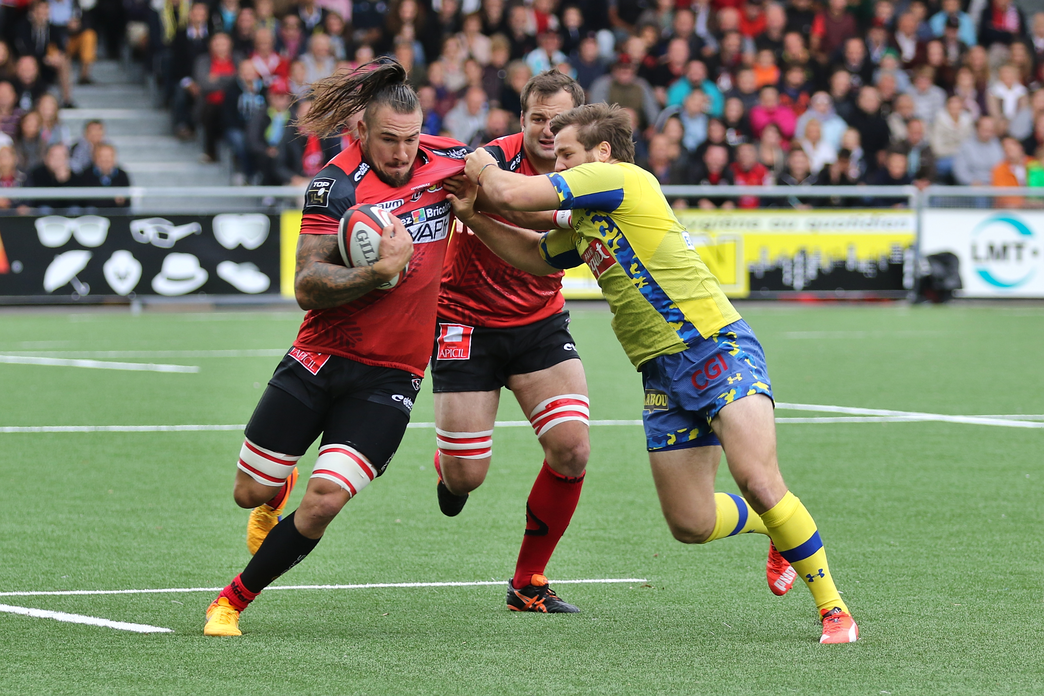 USO - ASM - 20150905 - Pierrick Gunther face à Camille Lopez